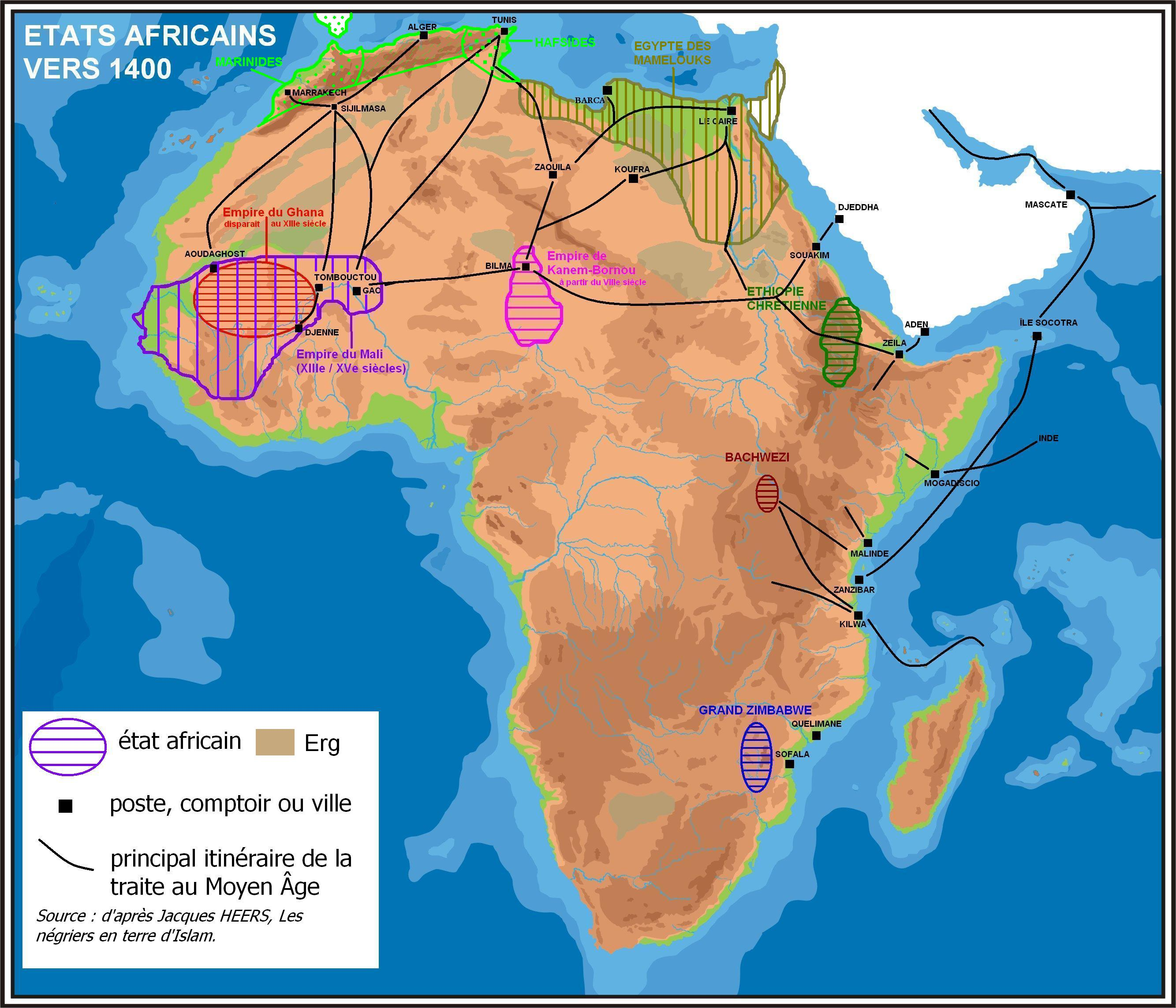 Carte de l'Afrique à la fin du Moyen Âge